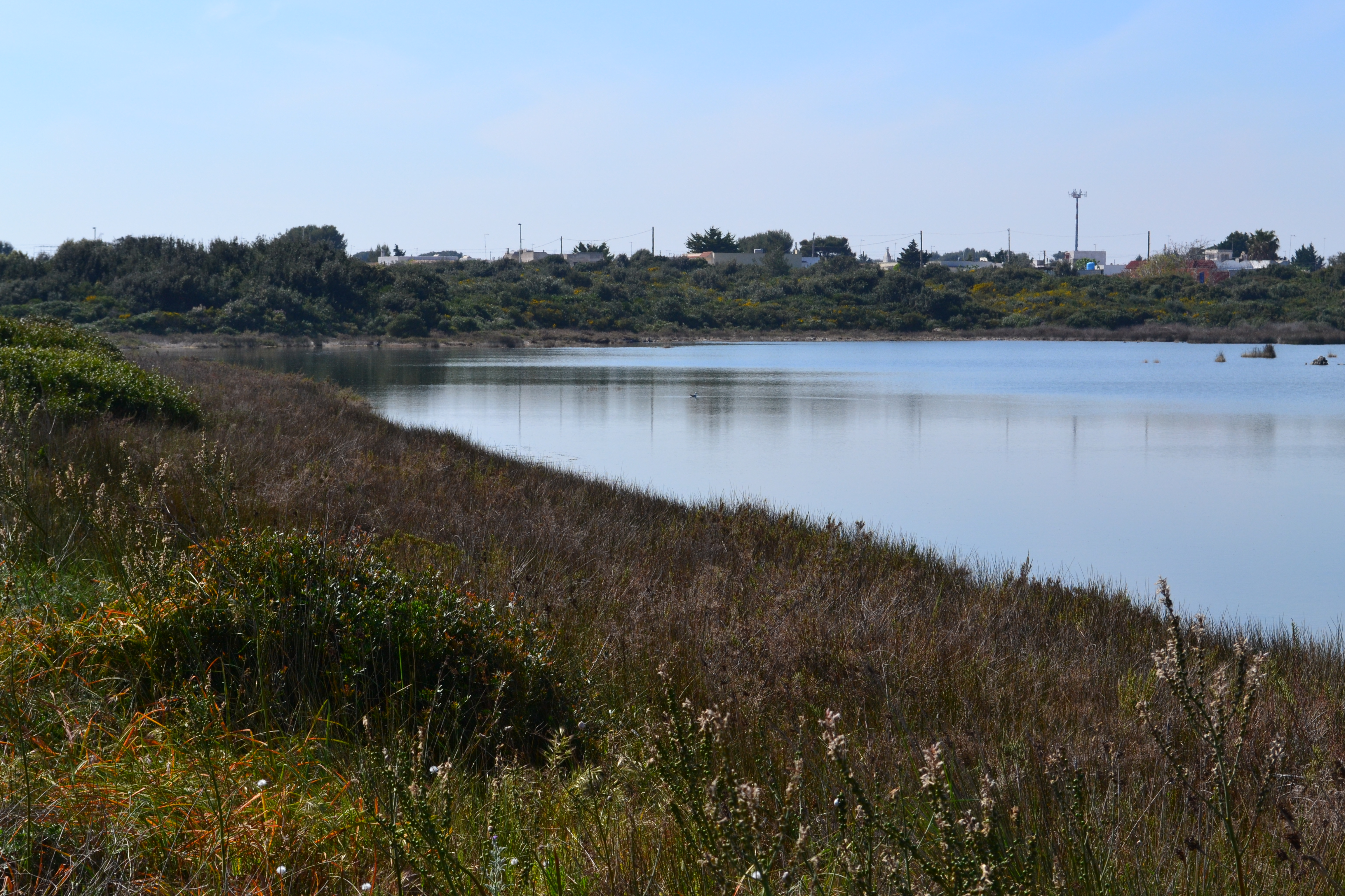 Salina dei Monaci - area protetta